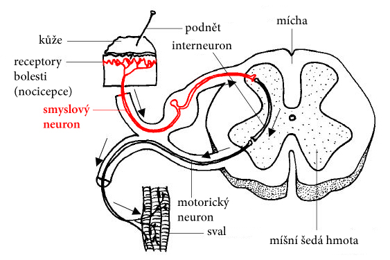 Zapojení smyslového neuronu v rámci reflexní odpovědi na bolestivý podnět.